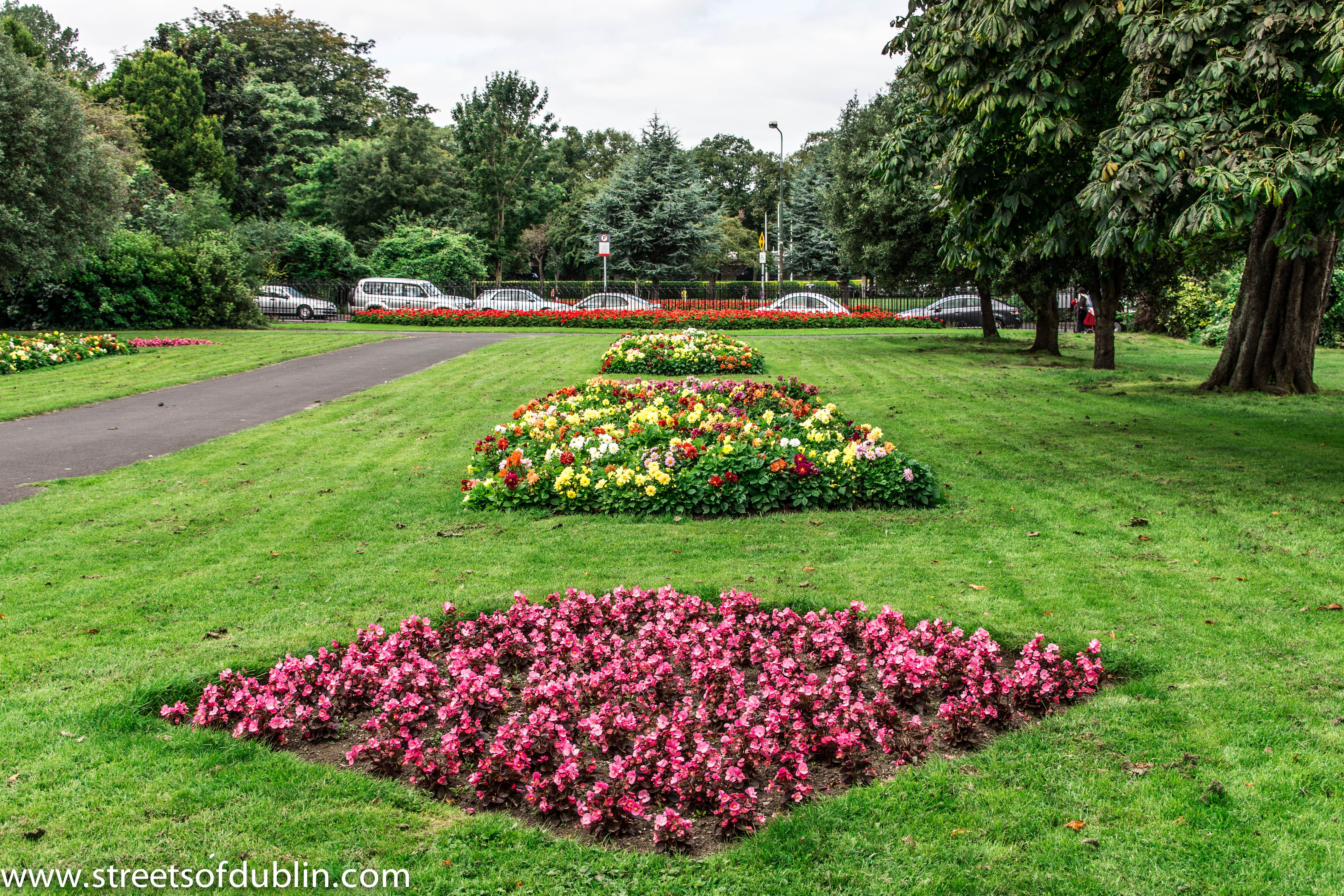 Herbert Park - Ballsbridge (Dublin) English | Polski | +/−